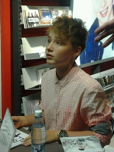 Isac Elliot vuonna 2013.